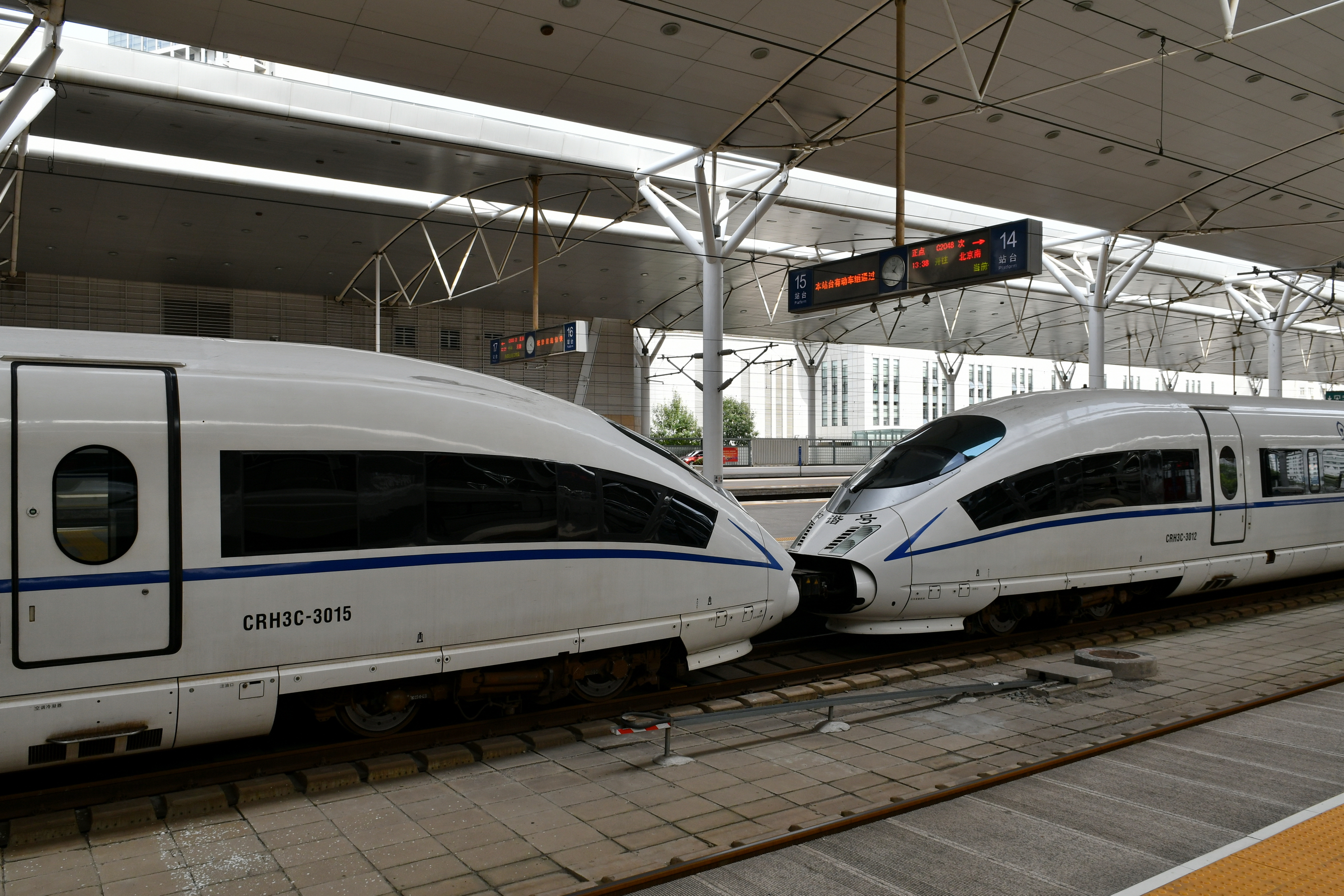 运用于京津城际铁路的CRH3C-3015 & 3012号车重联运行, 拍摄于天津站。